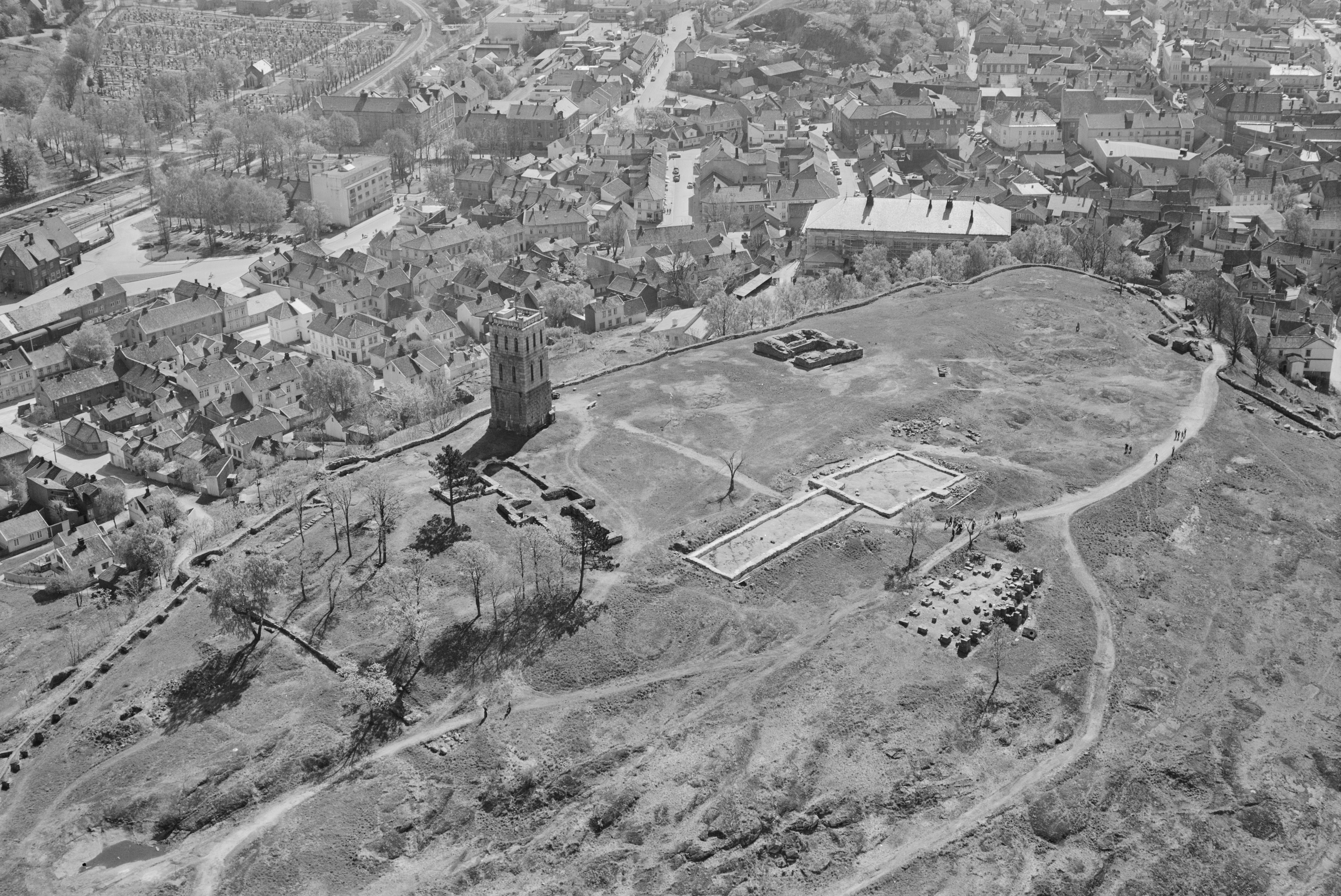 WF.S.50930